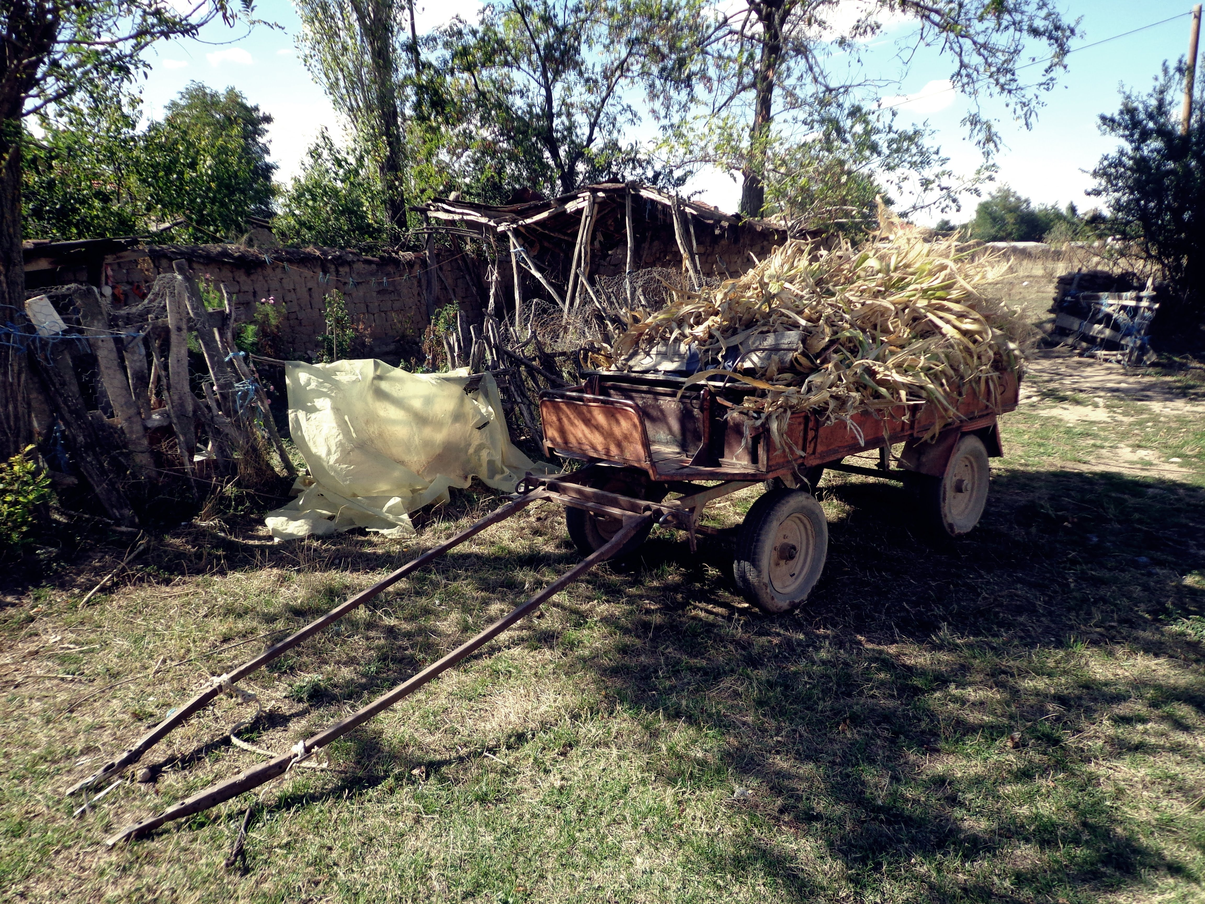 Стара запрежна кола со пченки во Село Ерековци, град Прилеп-Р.М.